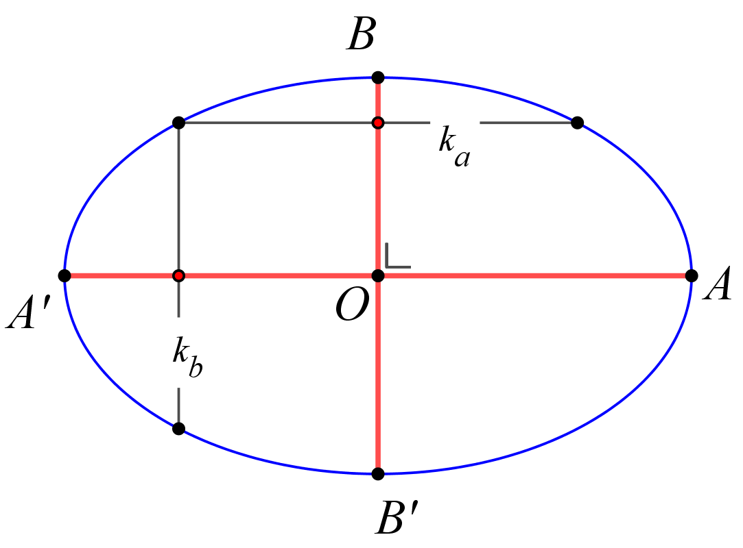 Voorbeeld 2